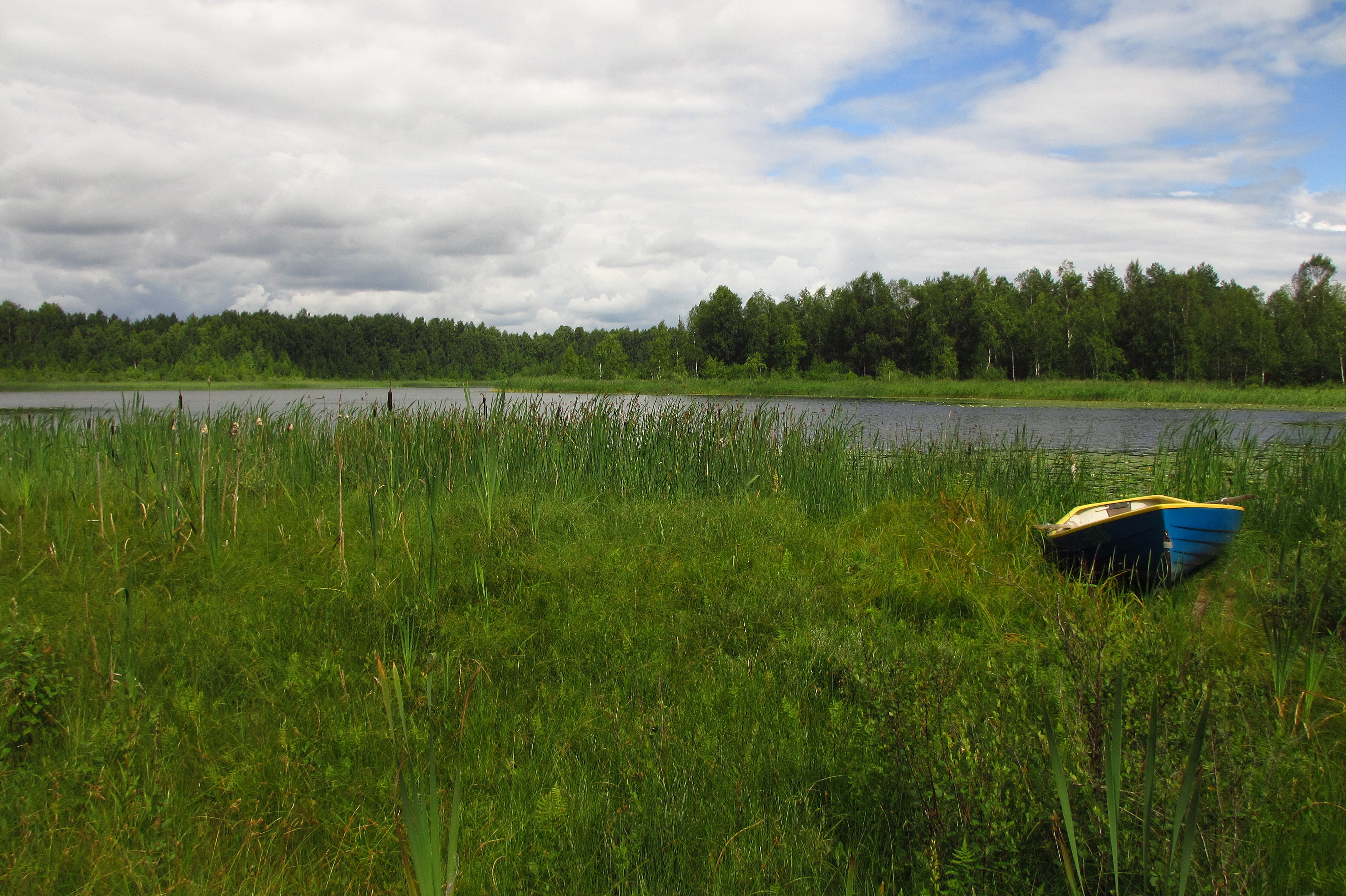 Suur Karujärv Nõo vallas